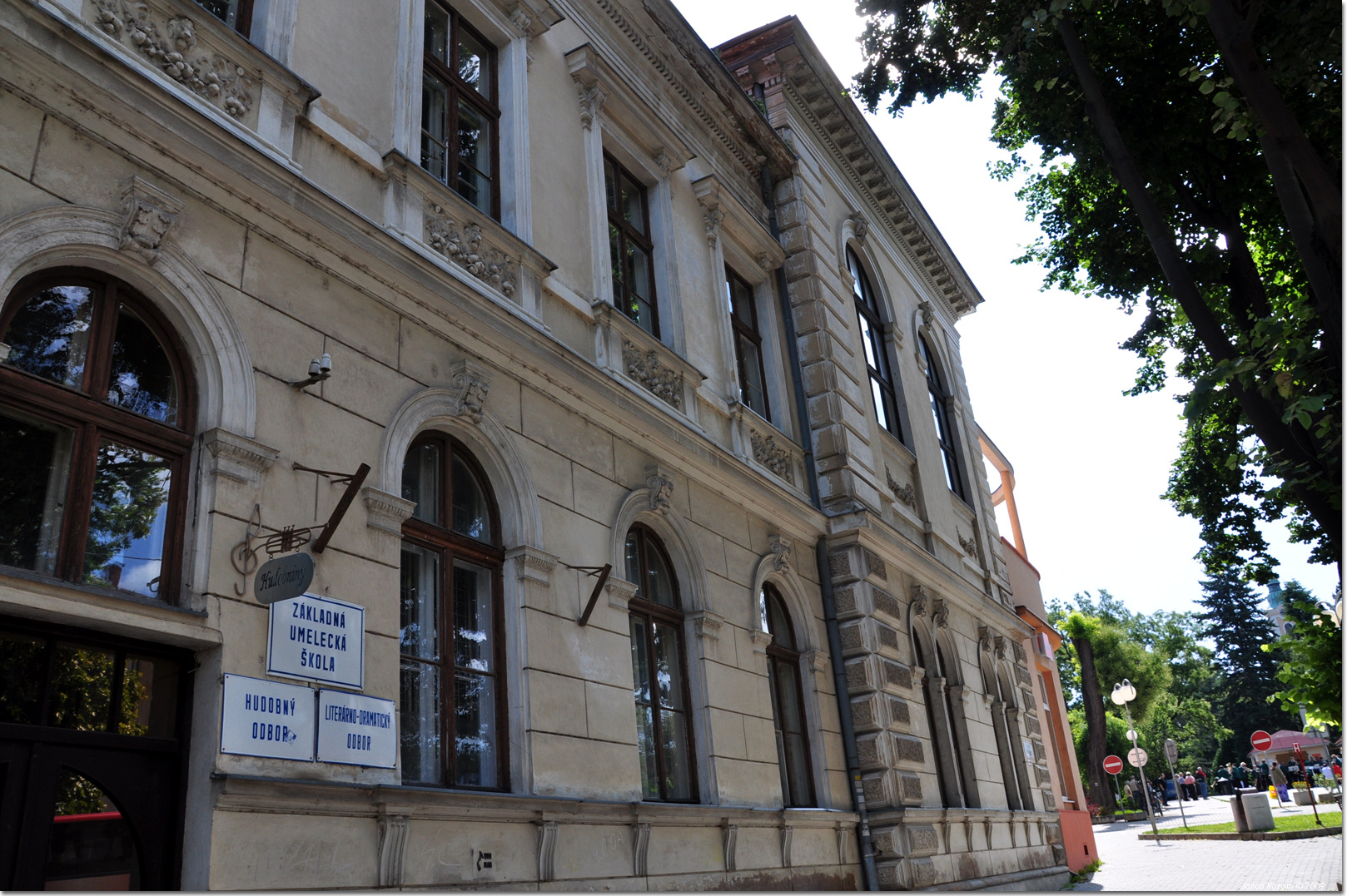 Початкова школа мистецтв